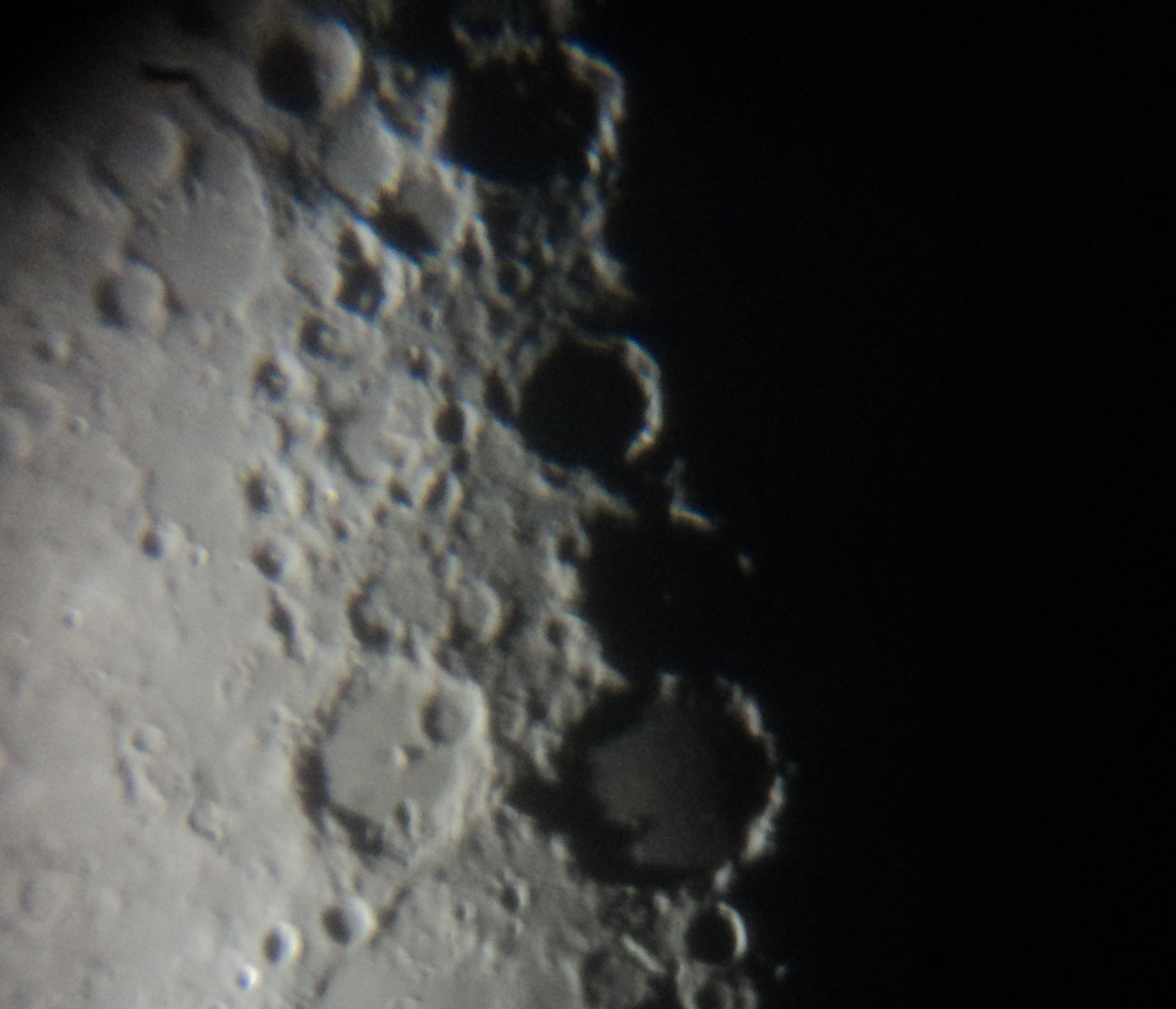 LUNA DE 7 DÍAS Y 19 HS. Luna en Cuarto Creciente. Se observan cuatro cráteres relevantes sobre el terminador, de arriba hacia abajo: Purbach, más juntos: Arzachel, Alfonso y Ptolomeo, a la izquierda de éste último el Albategnius. Con telescopio: 145 aumentos. 17.05.2013 18:16 hs. Villa Gesell. Argentina.